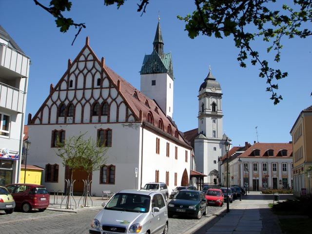 Fürstenwalde (Spree) - Altes Rathaus & Dom